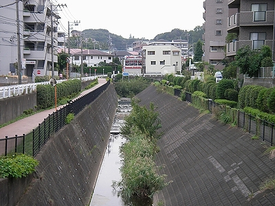 乞田川（河口付近）の画像